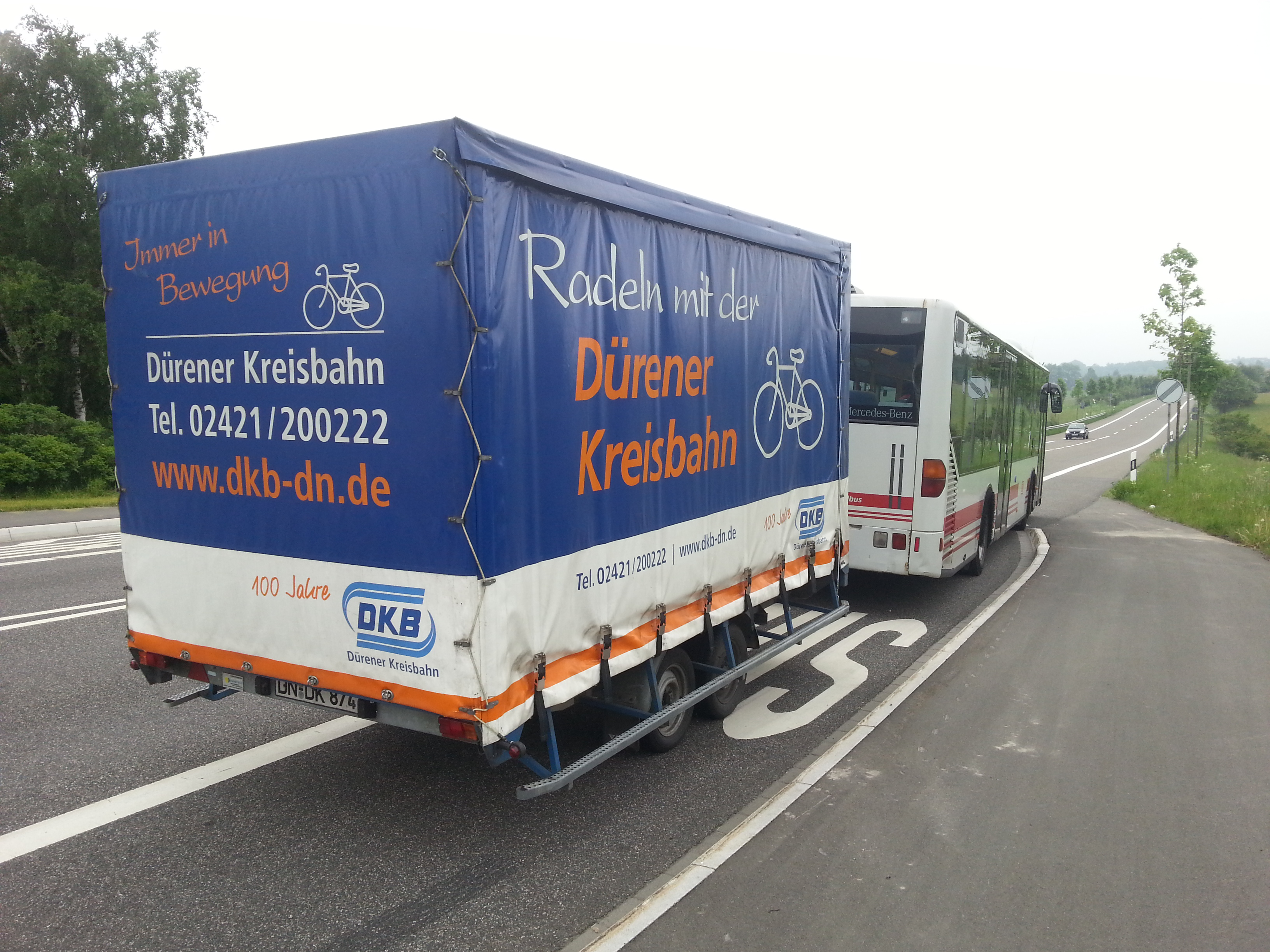 Bus der RVE auf der Schnellbuslinie SB63 (2013) aus Aachen an der Haltestelle Vogelsang Walberhof mit Fahrradanhänger der Dürener Kreisbahn. Kall.